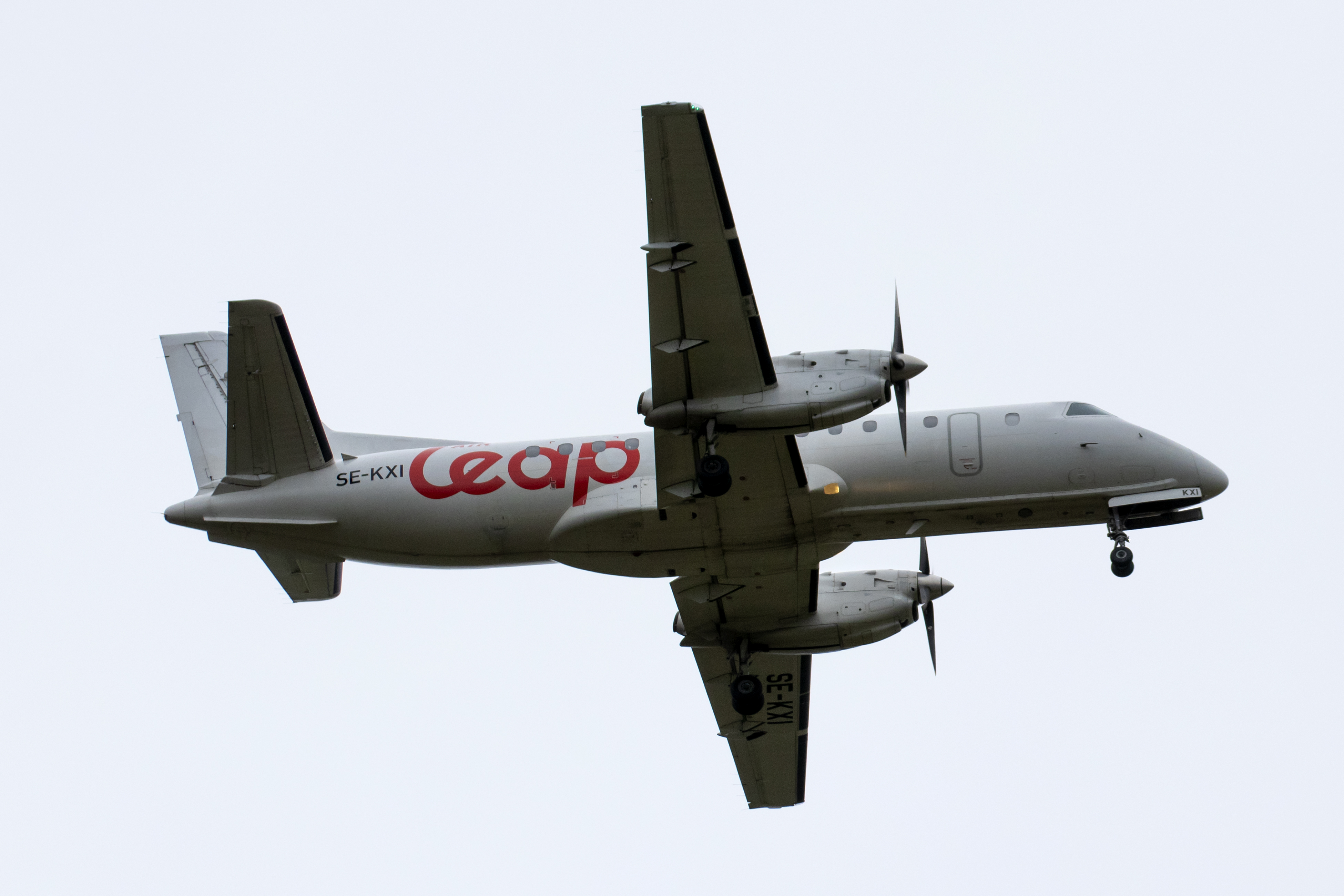 Saab 340 de Air Leap aterrando no aeroporto de Visby.